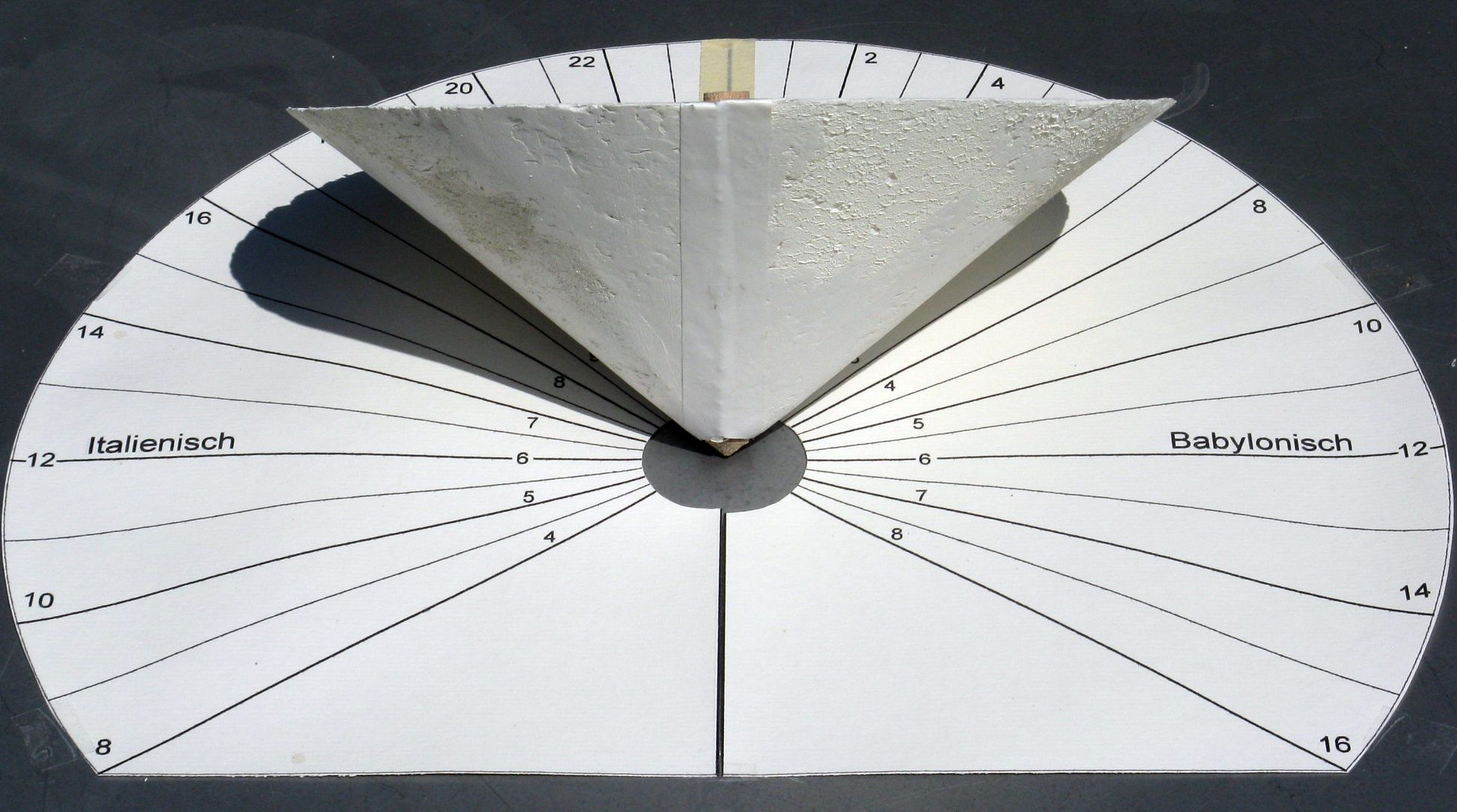 horizontale Kegel-Sonnenuhr, Modell (Kegel aus Styropor)Anzeige: Beginn der achten babylonischen Stunde, Ende der 14. italienischen Stunde(innere Ziffern für eine horizontale Sonnenuhr mit Polstab auf gleichem Zifferblatt)